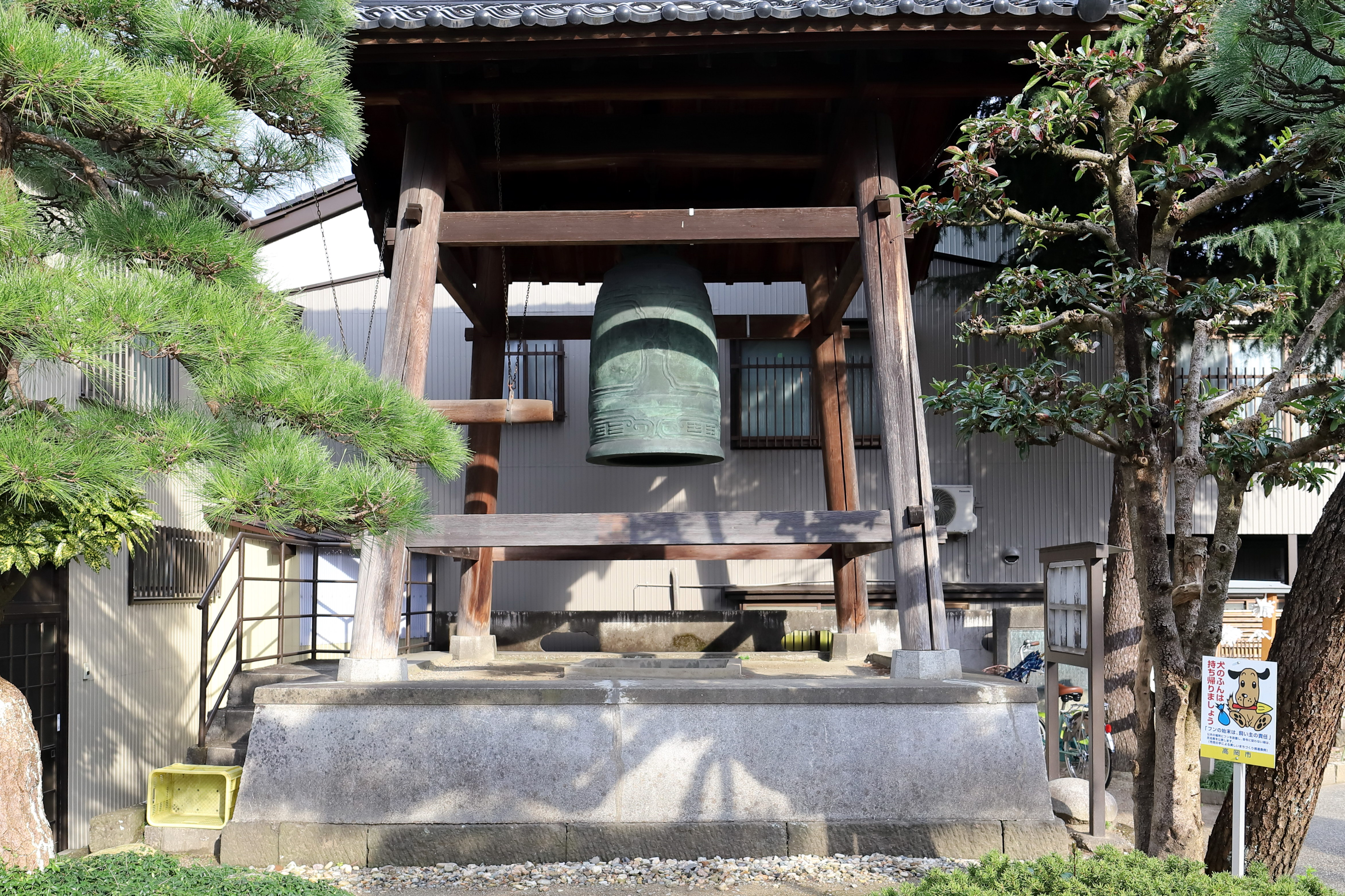 大佛寺 (高岡市)に保存されている時鐘